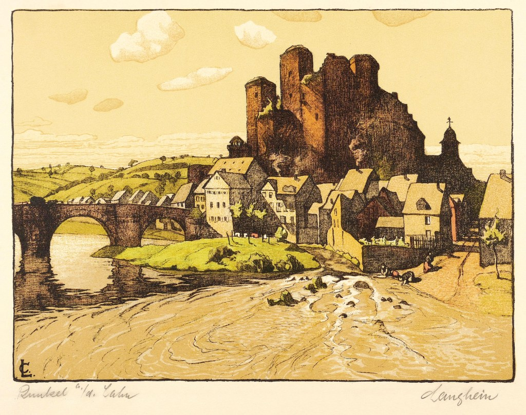 Farblithografie von Carl Langhein. Schloß Runkel a. d. Lahn, 1904 (vielleicht auch früher). Gedruckt in der Kunstdruckerei Künstlerbund Karlsruhe (Im Katalog von 1904 noch nicht erfasst, aber im Katalog von 1908)